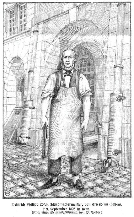 Heinrich Philipp Loesch (1826–1896) Schweizer Schuhmachermeister und Stifter